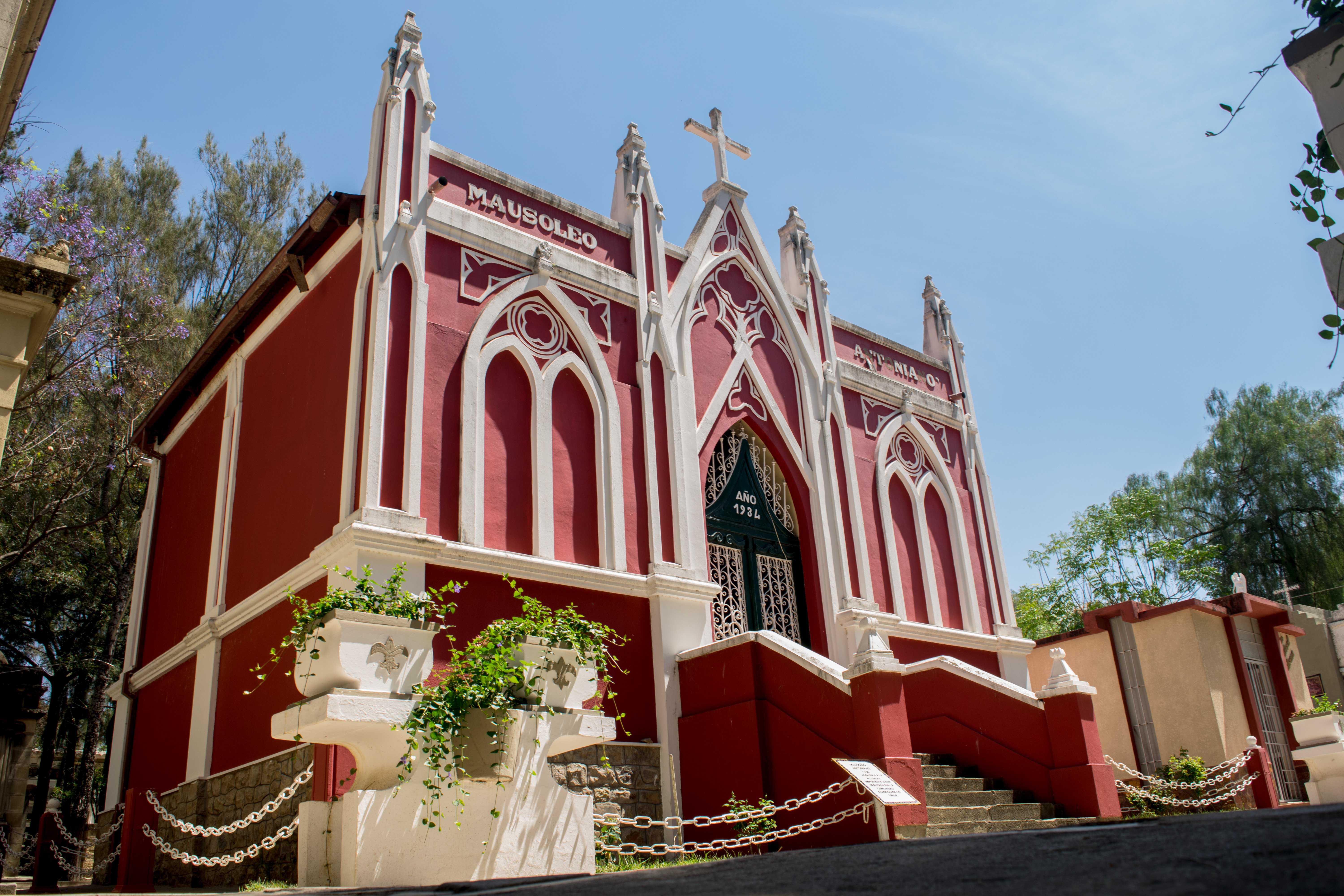 Cementerio General de Tarija This medium shows the protected monument with the number T/F0-001 in Bolivia.